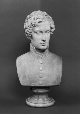 Napoléon II en buste adulte